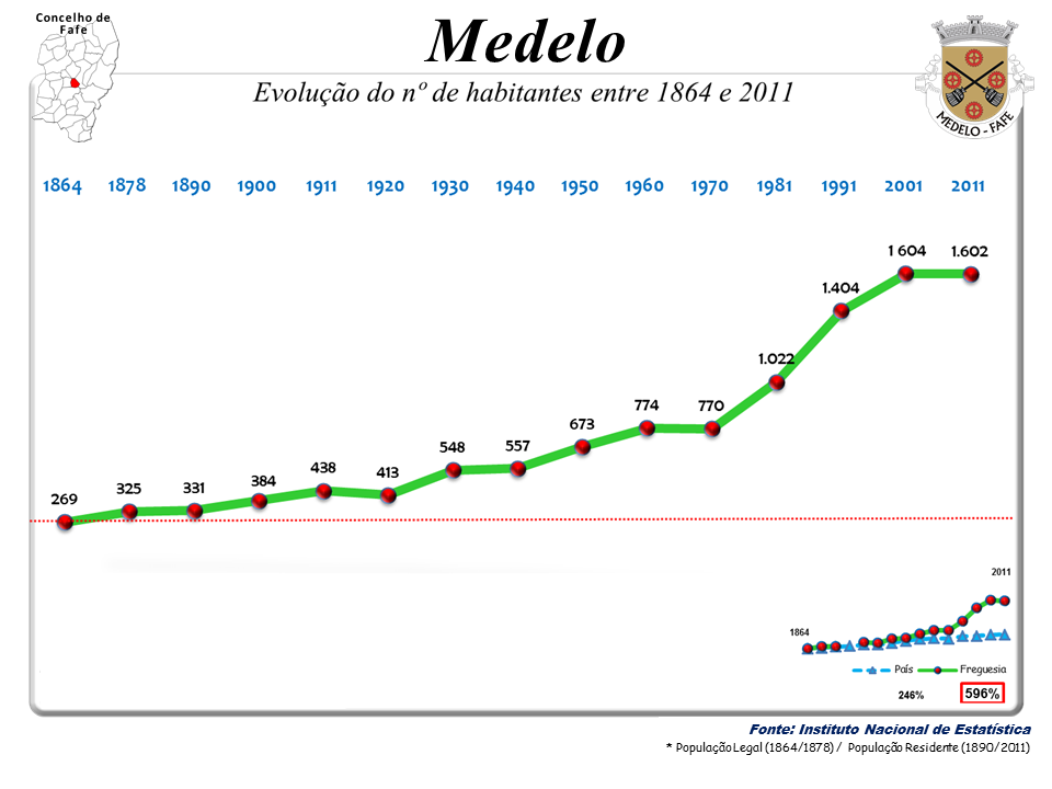 Censos 1864/2011